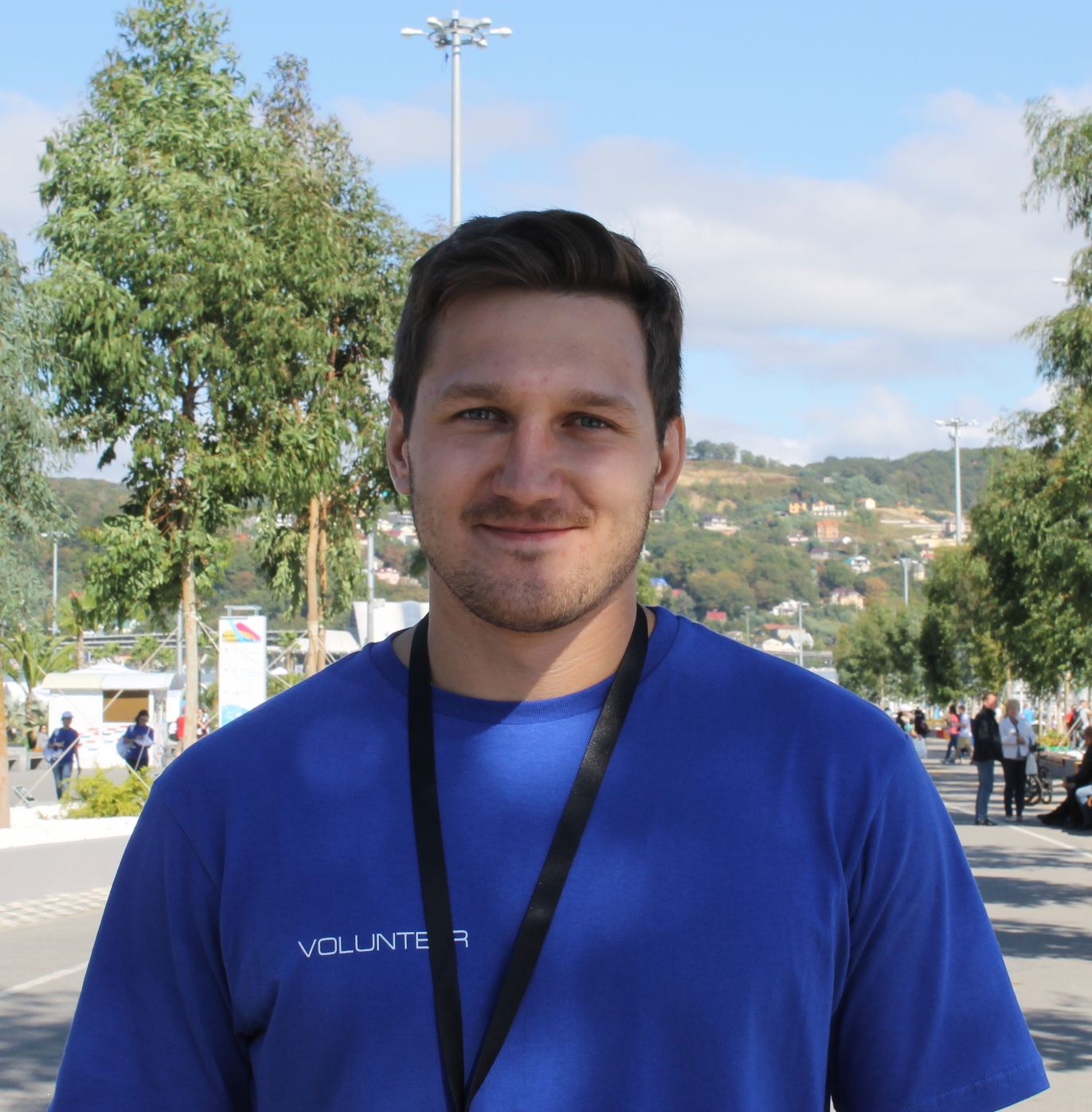 Серебряный призёр зимних Олимпийских игр 2014 в сноуборд-кроссе Николай Олюнин в Олимпийском парке Сочи во время соревнований Формула 1, 2015 год